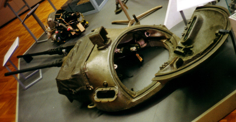 (12,7 mm) MG-Turm vom M60 (Ausgestellt im Militärhistorischen Museum der Bundeswehr in Dresden)